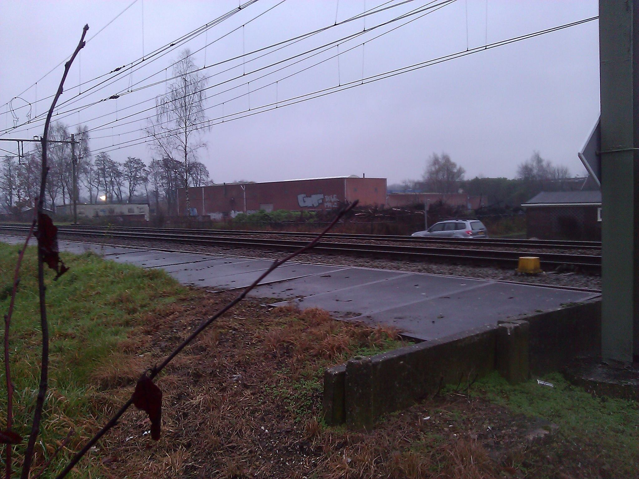 het perron van de voormalige stopplaats fbk stadion